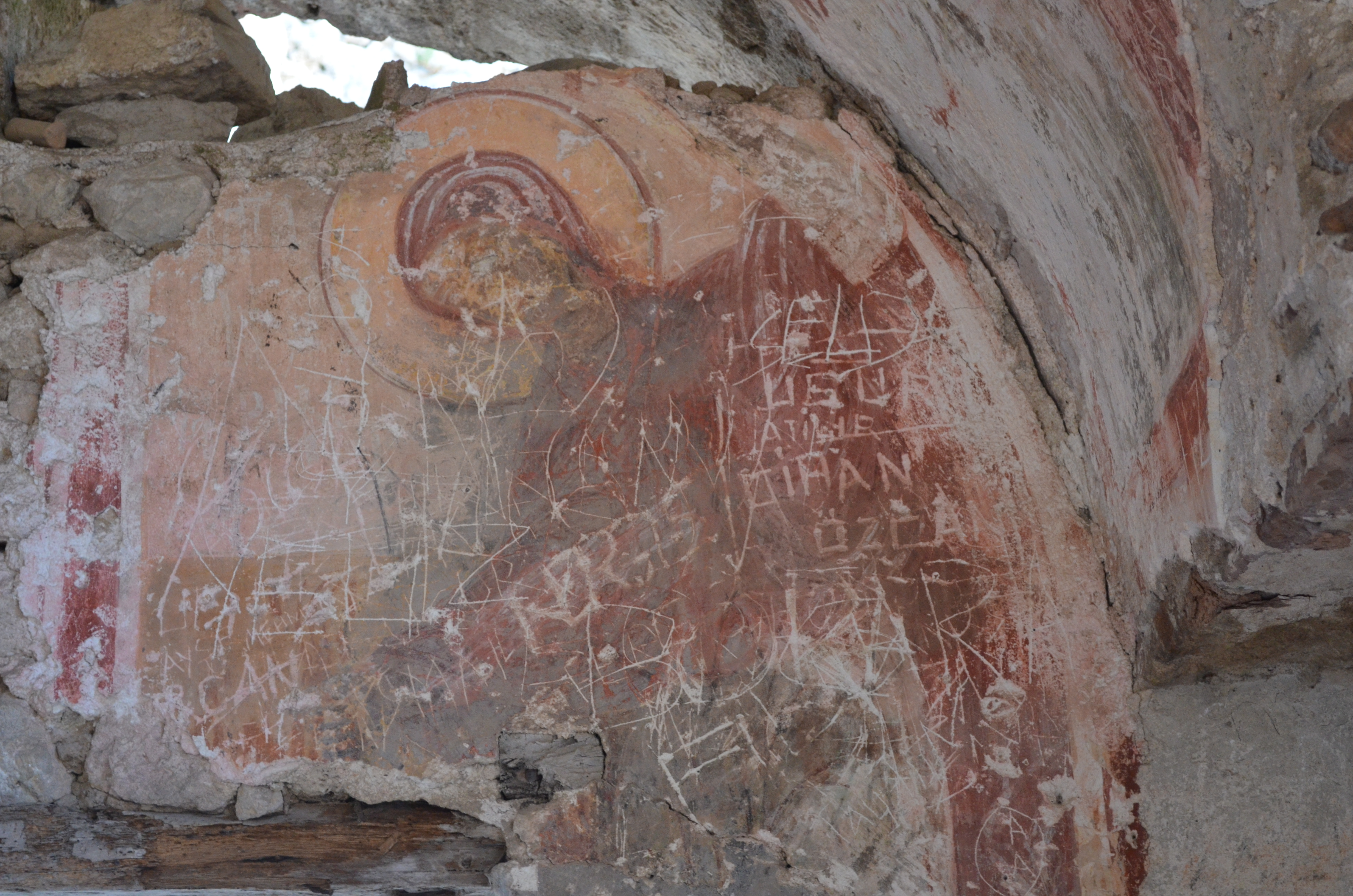 Kilisedenin iç duvarında bulunan hasar görmüş Meryem freski